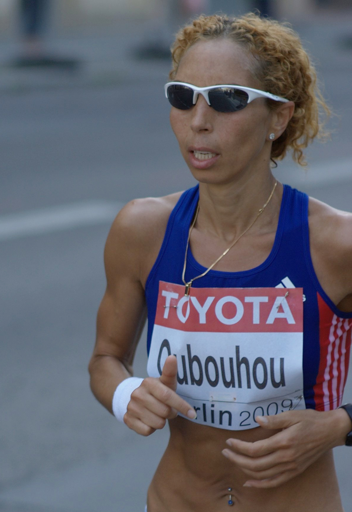 Leichtathletik Weltmeisterschaft Berlin 2009, Frauen-Marathon. Yamna Oubouhou.